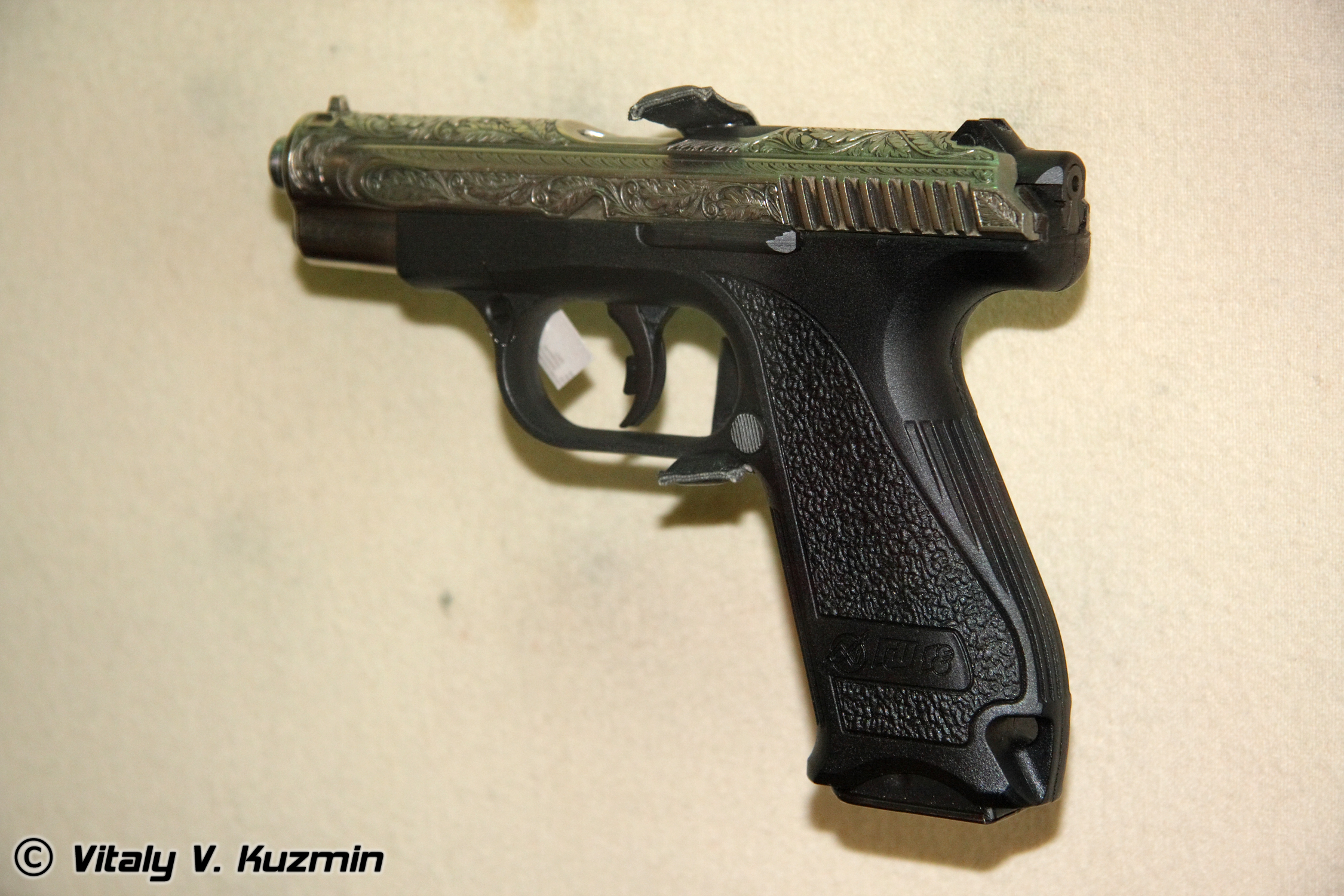 ГШ-18 (GSh-18)